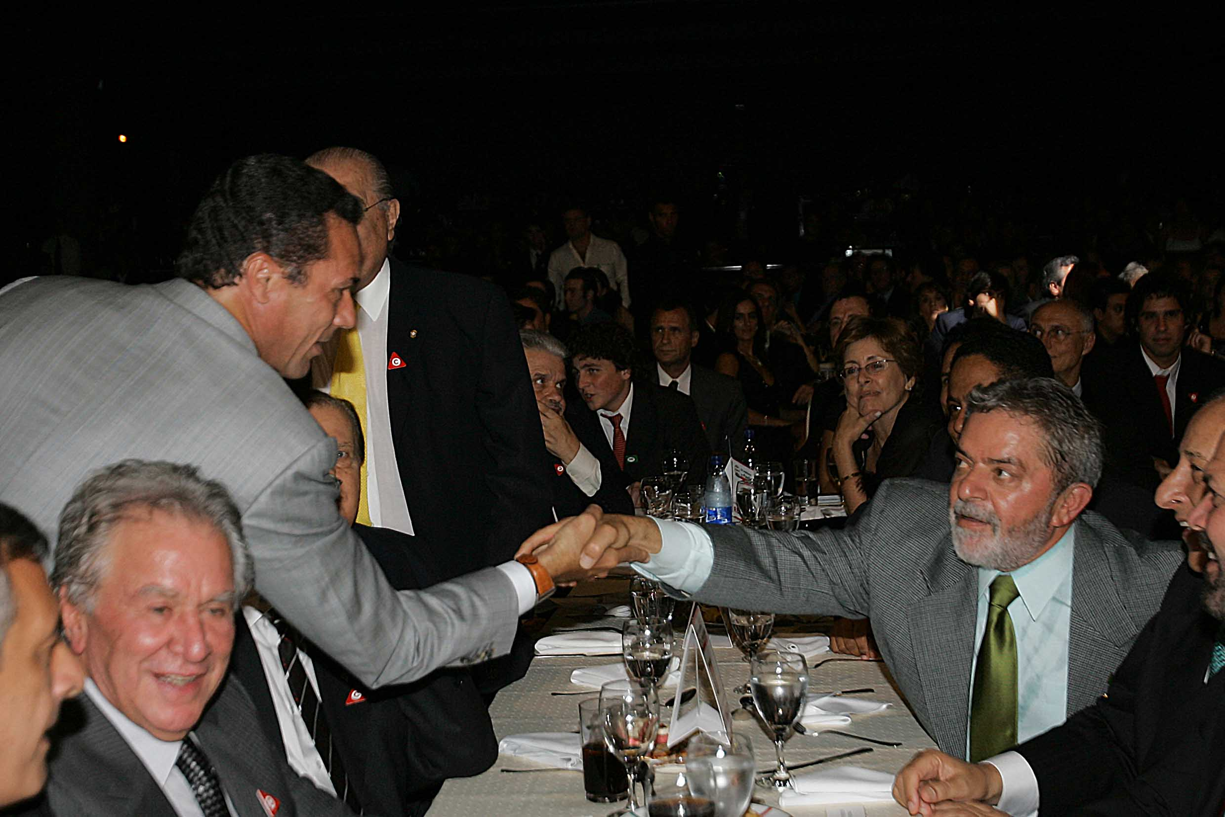 São Paulo (SP) - Presidente Lula cumprimenta o técnico do Santos, Wanderley Luxemburgo, campeão paulista de 2006. (Foto Ricardo Stuckert/PR).